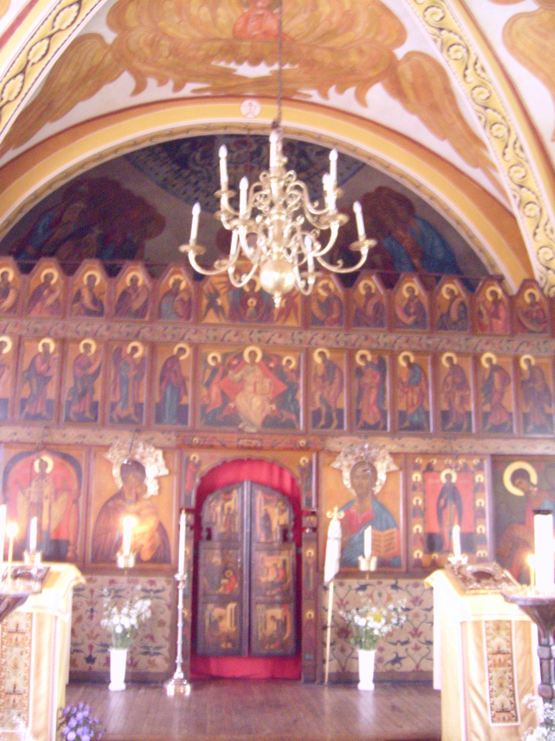 Institut de théologie orthodoxe Saint-Serge de Paris